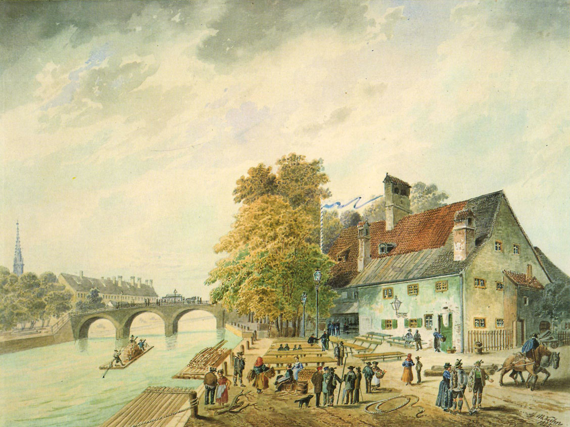 Die berühmte Flößerwirtschaft an der Unteren (Floß-)Lände, der heutigen Steinsdorfstraße, vor dem Abbruch (1886). Im Hintergrund die innere Ludwigsbrücke, die alte Isarkaserne auf der Kohleninsel, (heute Museumsinsel) und der Turm der Mariahilfkirche.